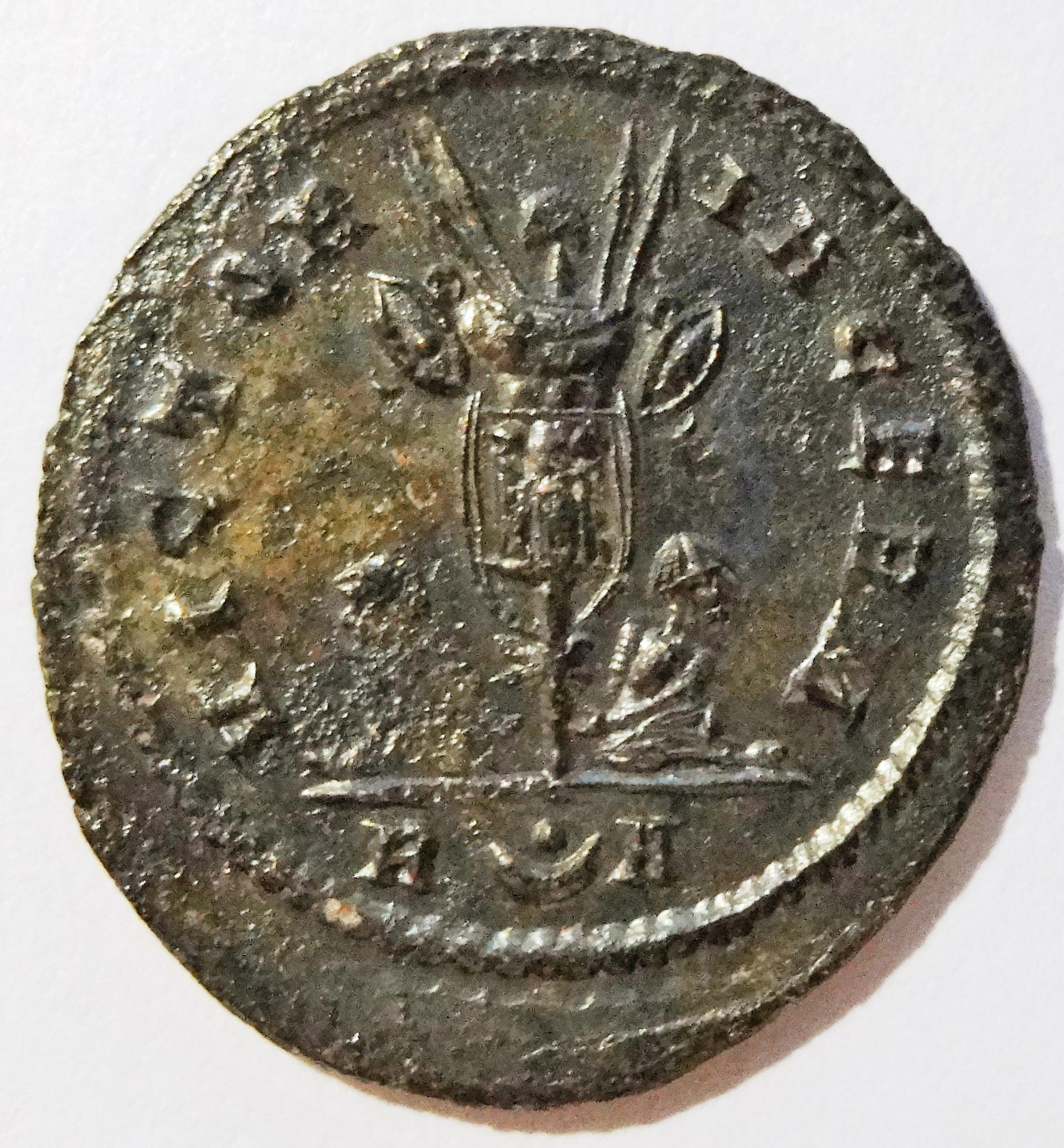 Rückseite Antoninian des Probus', Umschrift VICTORIA GERM um Tropaion und gefangene Germanen, Kampmann 112.89.2